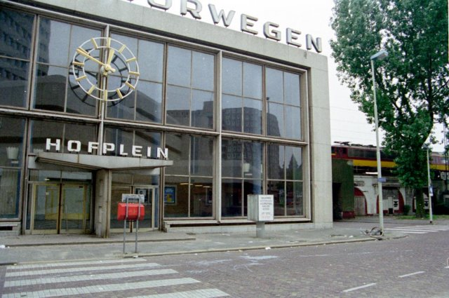 De voorzijde van station Hofplein; het Binnenrotteviaduct is nog volop in gebruik, de Willemspoortunnel wordt geconstrueerd. De klok geeft al enige tijd twee maal per etmaal exact de juiste tijd aan: hij staat domweg stil. Er wordt aan onderhoud al een poos niets meer gedaan; in de stationshal is alles dichtgetimmerd. Rotterdam, juni 1988.